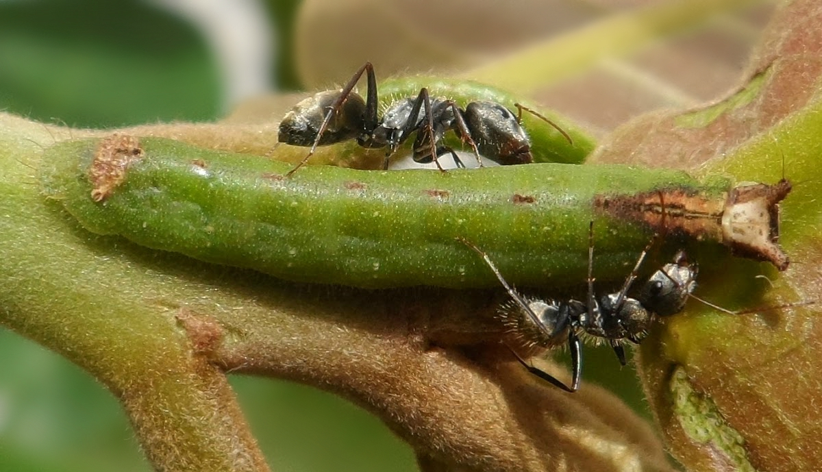 Formiga Camponotus cuidado de larva de Synargis calyce